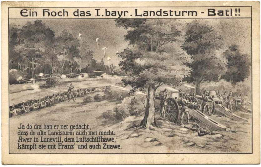 1. Bayerisches Landsturm-Bataillon, Weltkriegs-Erinnerungs-Postkarte, 1914 (eigener Scan von eigener alter Postkarte)